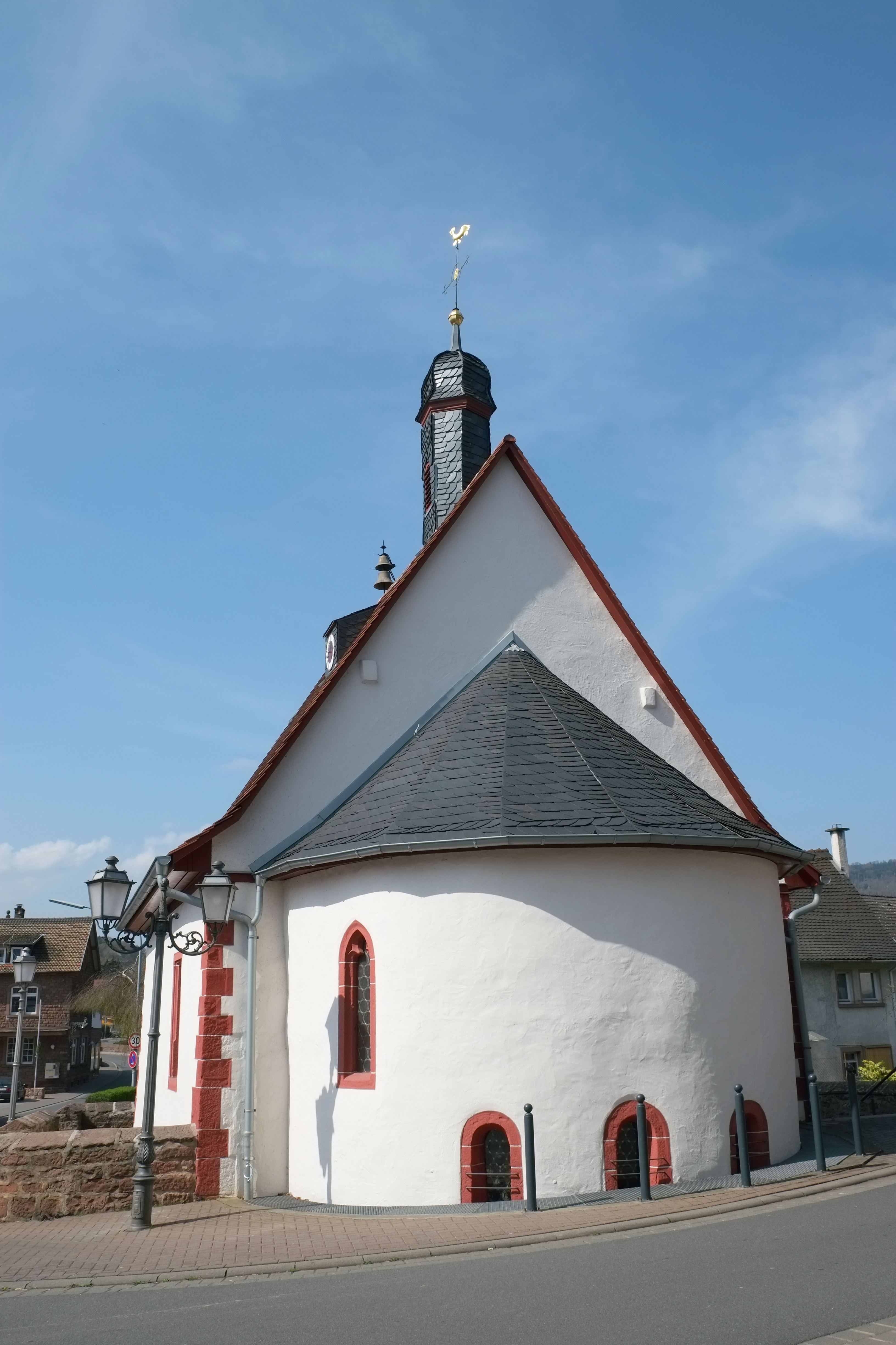 Katholische Kapelle St. Valentin in Eichenbühl im Landkreis Miltenberg (Bayern, Deutschland)